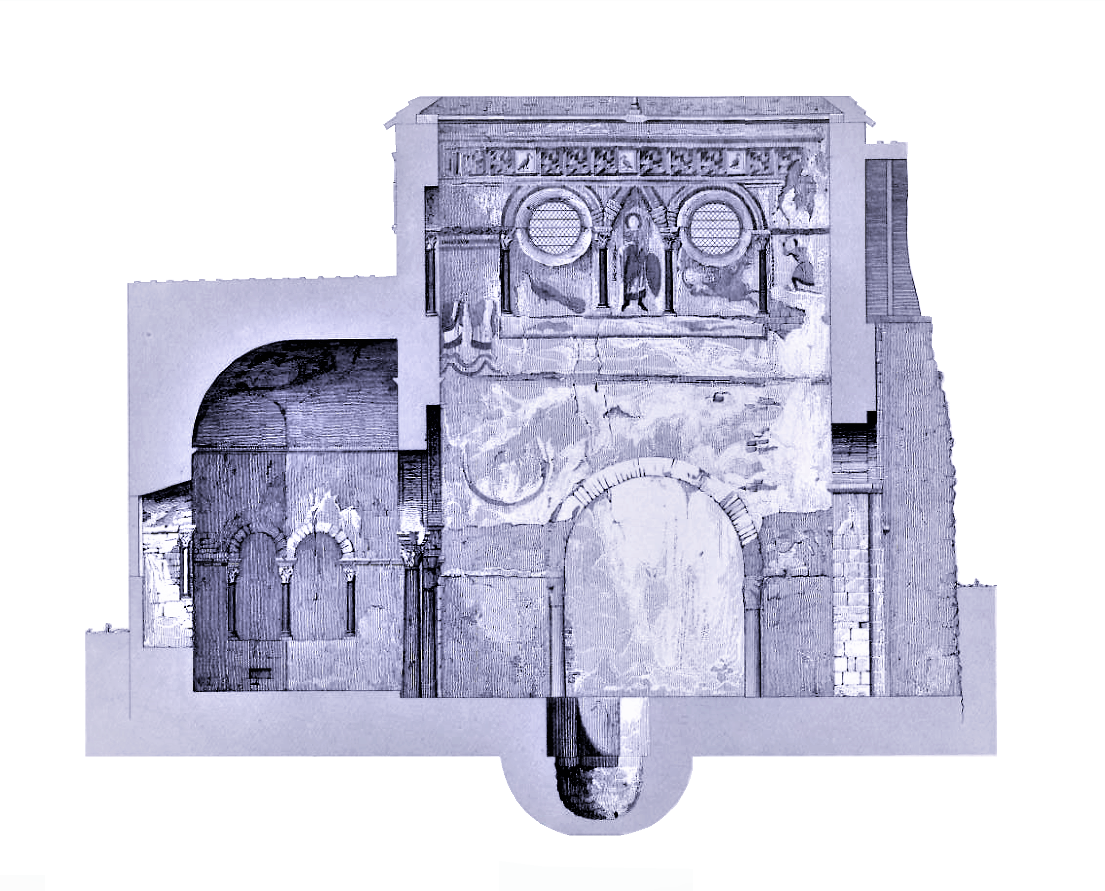 Baptistère de Poitiers, coupe Est-Ouest en 1857 (image du domaine public (Gailhabaud) modifiée)